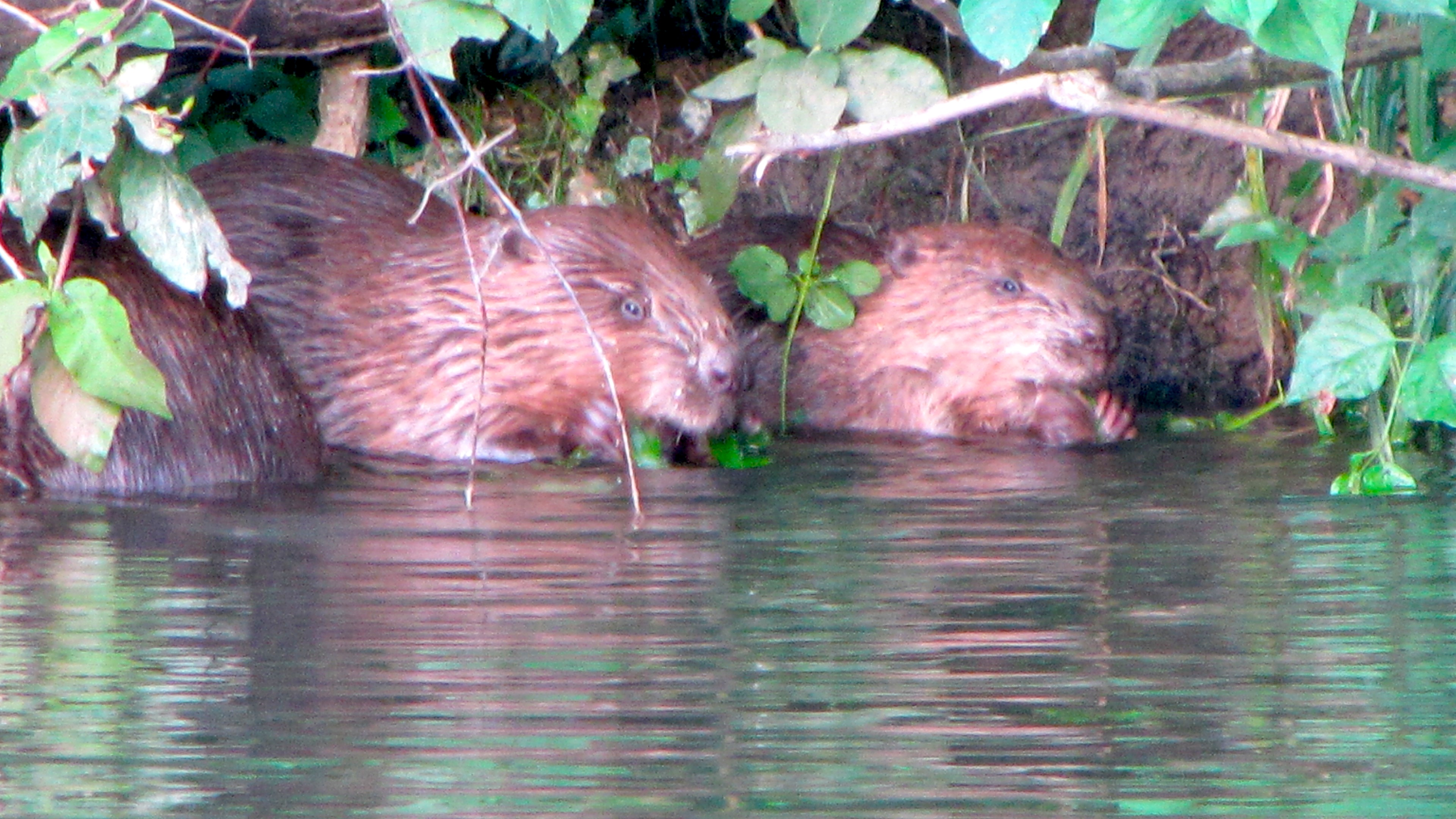 Des castors dans l'Areuse à Boudry